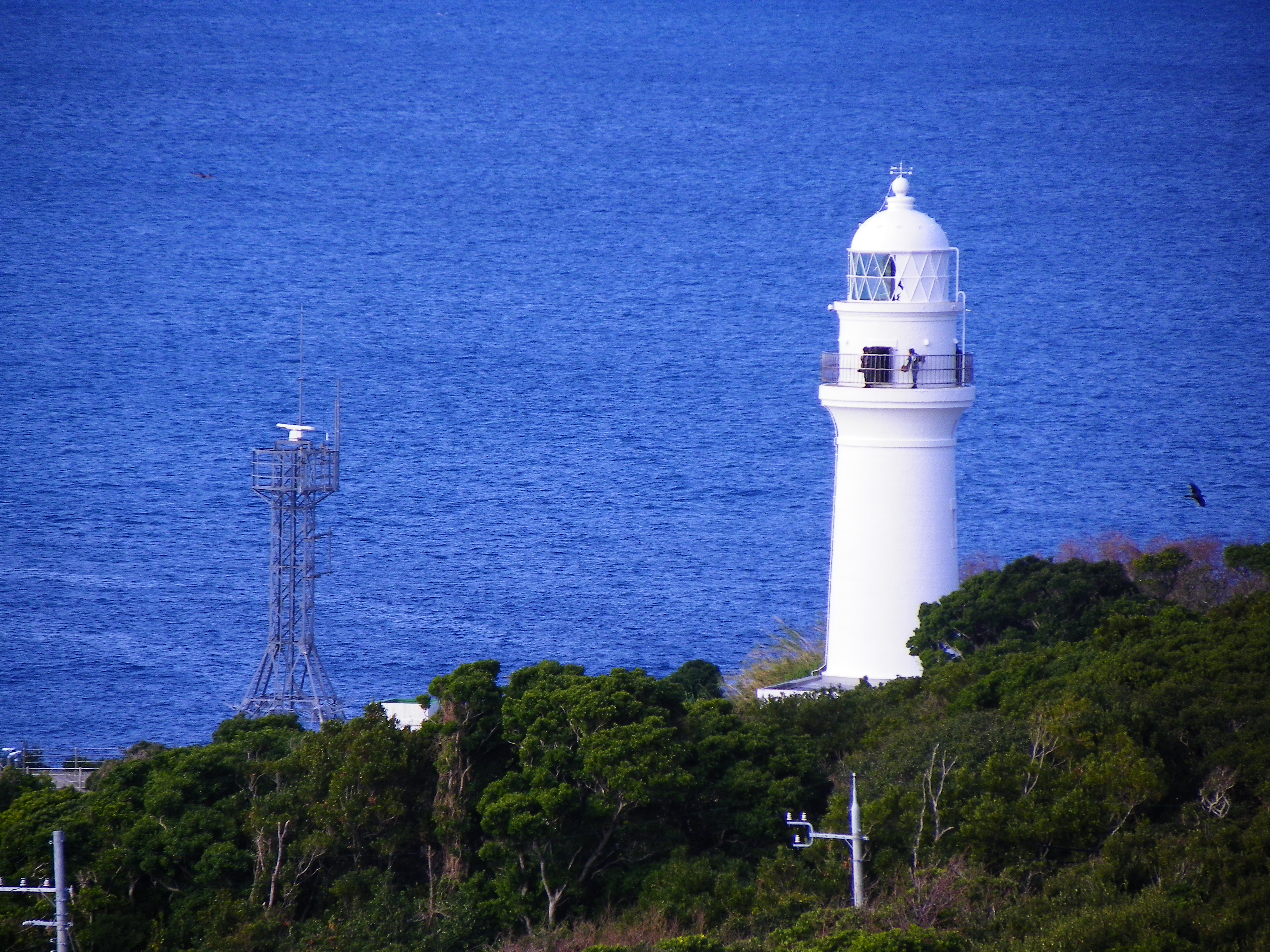 潮岬観光タワー展望台から望む潮岬灯台。